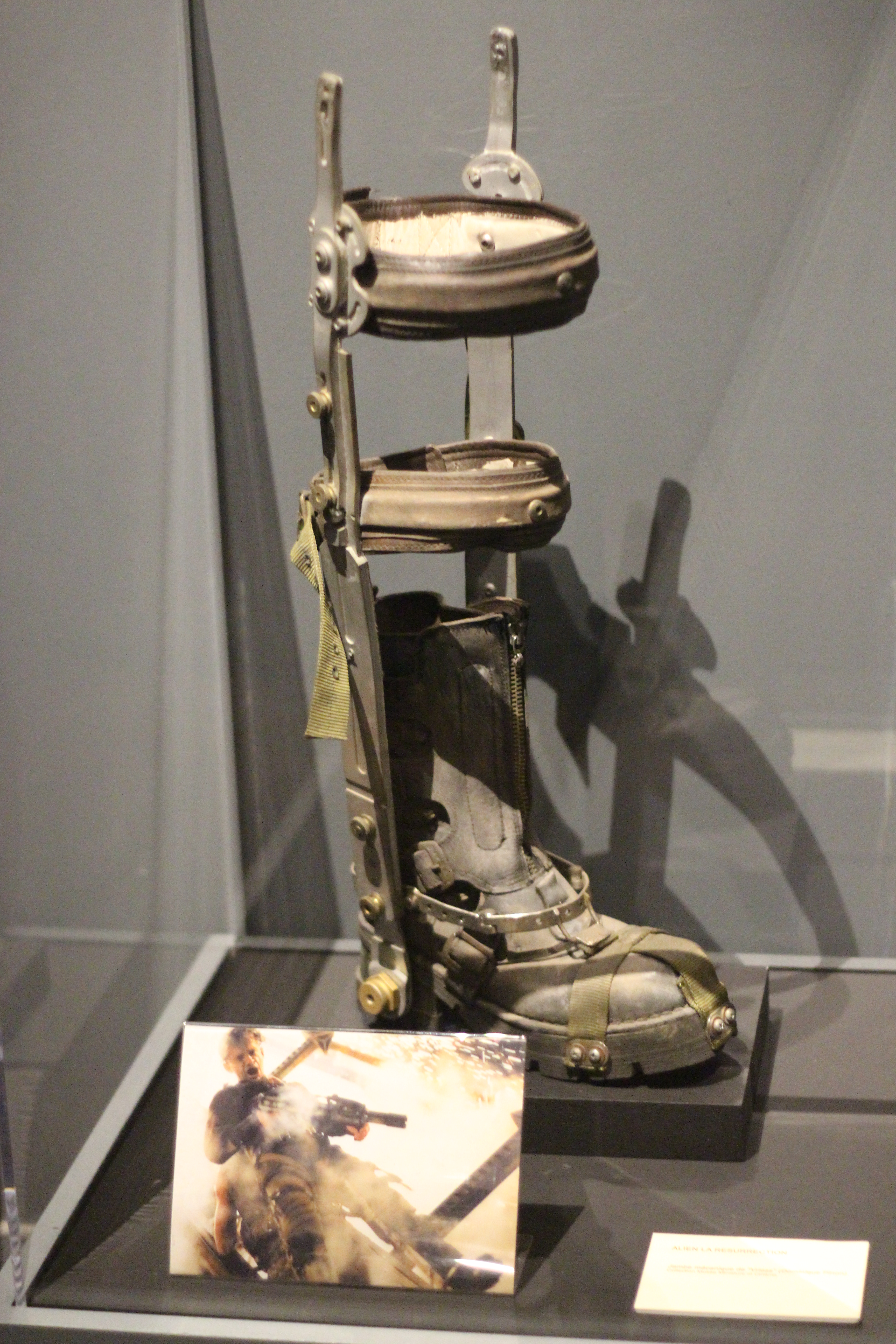 Exposition "Caro/Jeunet" au musée Minature et Cinéma en 2018-2019.